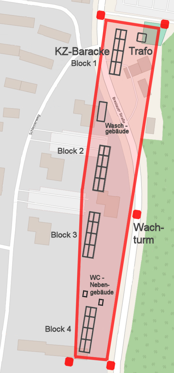 Rekonstruktionsskizze des früheren KZ-Außenlagers Laagberg, Grundlage ist Openstreet Map und ein Luftbild der Stadt Wolfsburg, hier in höherer Auflösung (pdf) und Luftbilder in einem Ausgrabungsbericht.